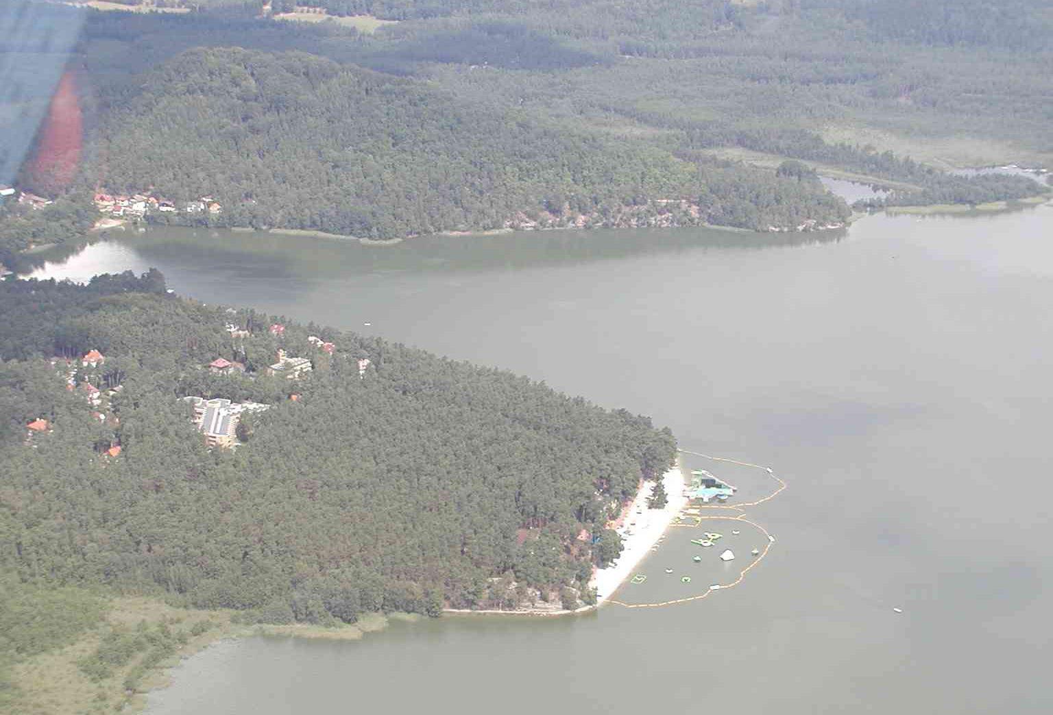 Pobřeží Máchova jezera